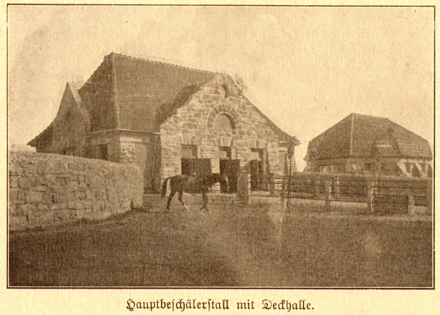 Das Gestüt Altefeld. Hauptbeschälerstall mit Deckhalle.